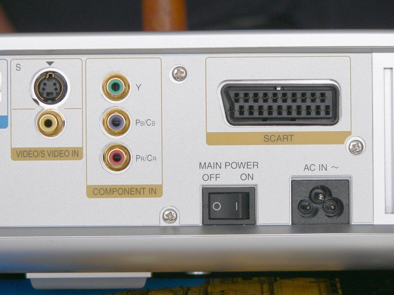 Anschlüsse eines Beamers